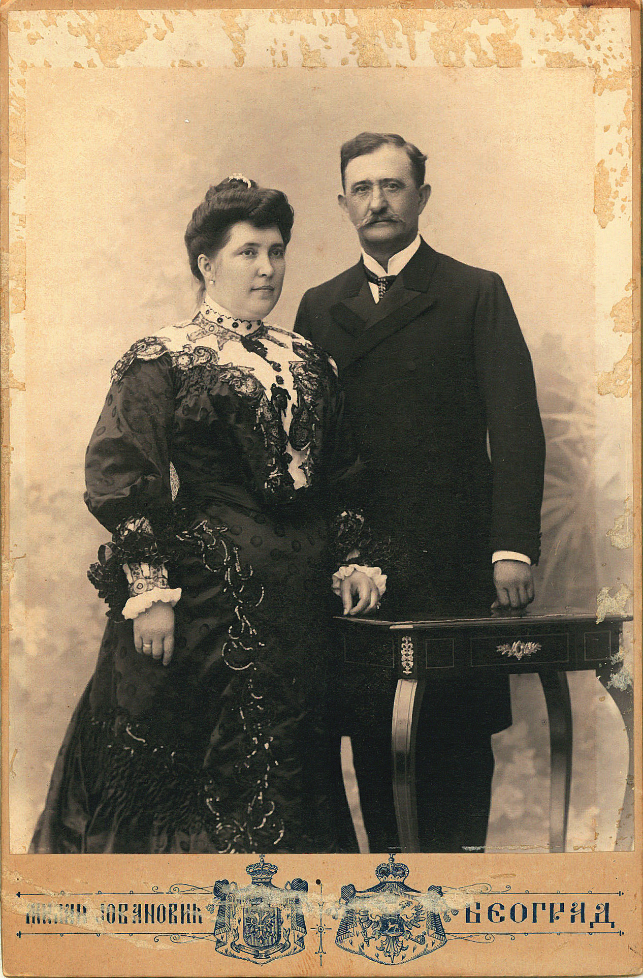 Фотографија Голуба и Босиљке Јанић. Власници фотографије предали у јавно власништво. Голуб и Босиљка нису имали децу, њихови правни наследници, најближи рођаци власници фотографије. Аутор фотографије Милан Јовановић (умро 1944). Фотографија стара 100 година.